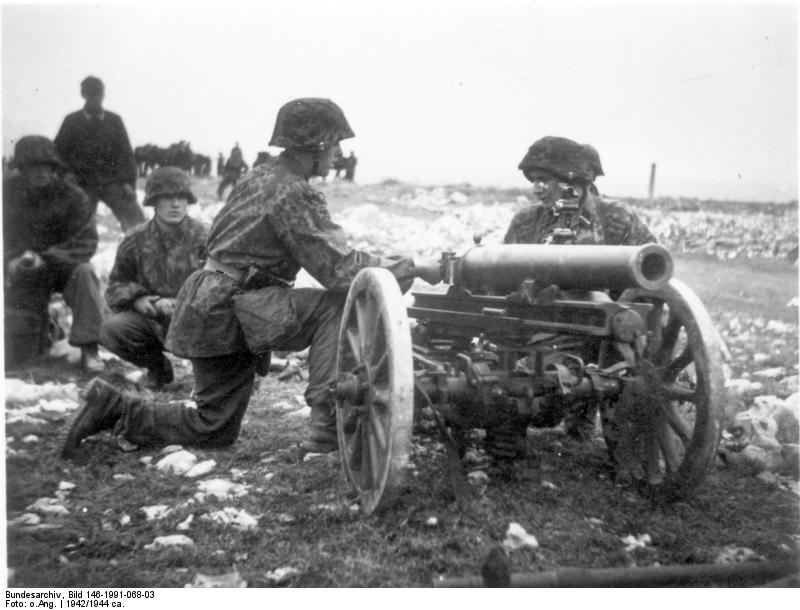 Die Karstschulungsstätte Pottenstein/Oberfranken Ein Bilderatlas mit Erläuterungen Zusammengestellt von SS-Standartenführer Dr. Brand. Dem SS-Karstwehrbataillon stehen im Einsatz erbeutete Geschütze zur Verfügung, die wesentlich zu den Erfolgen der Truppe beigetragen haben.